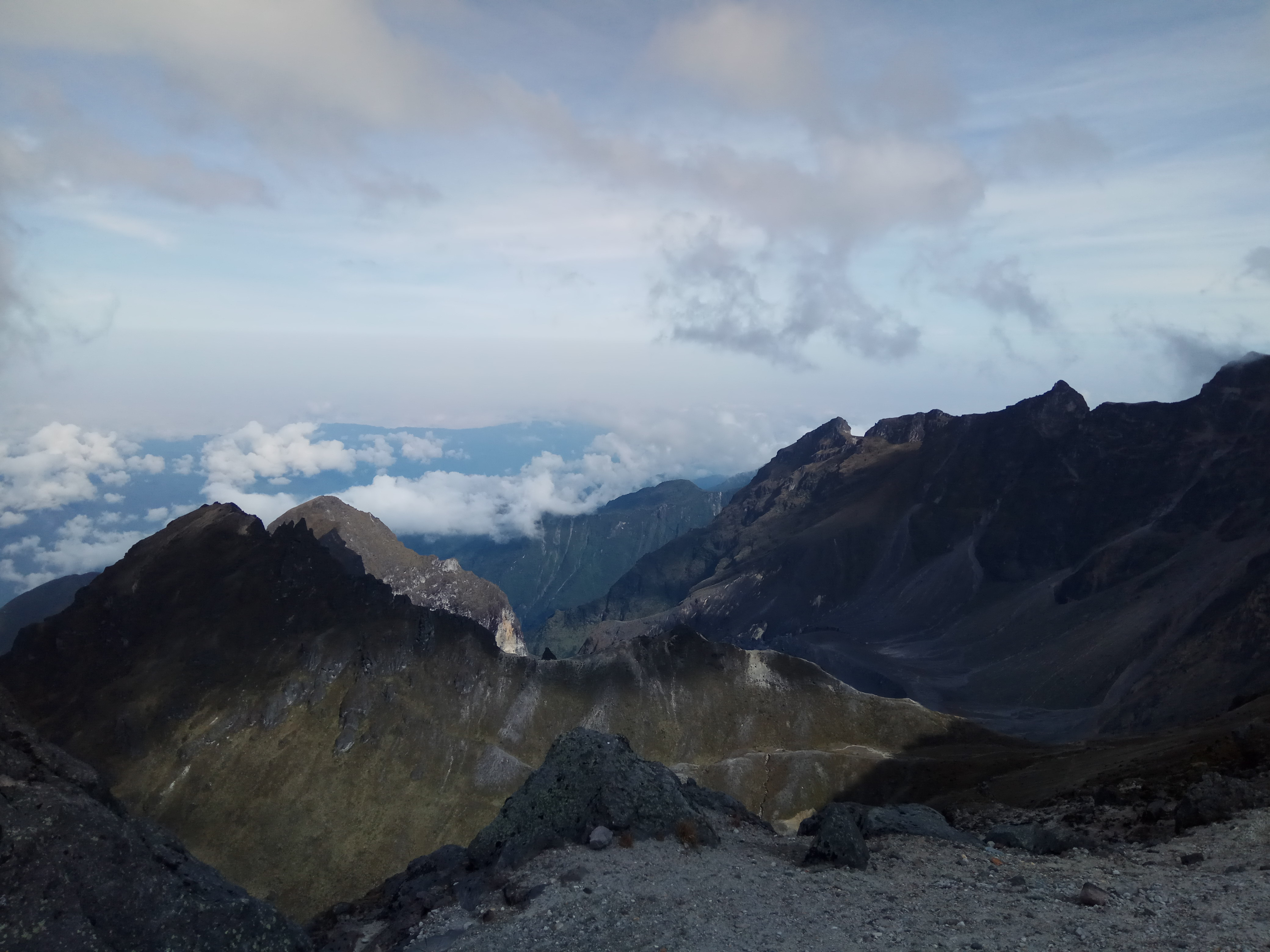 Cráter del volcán Guagua Pichincha, en el se pueden apreciar las fumarolas.